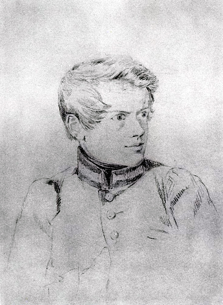 Автопортрет. 1813-1816